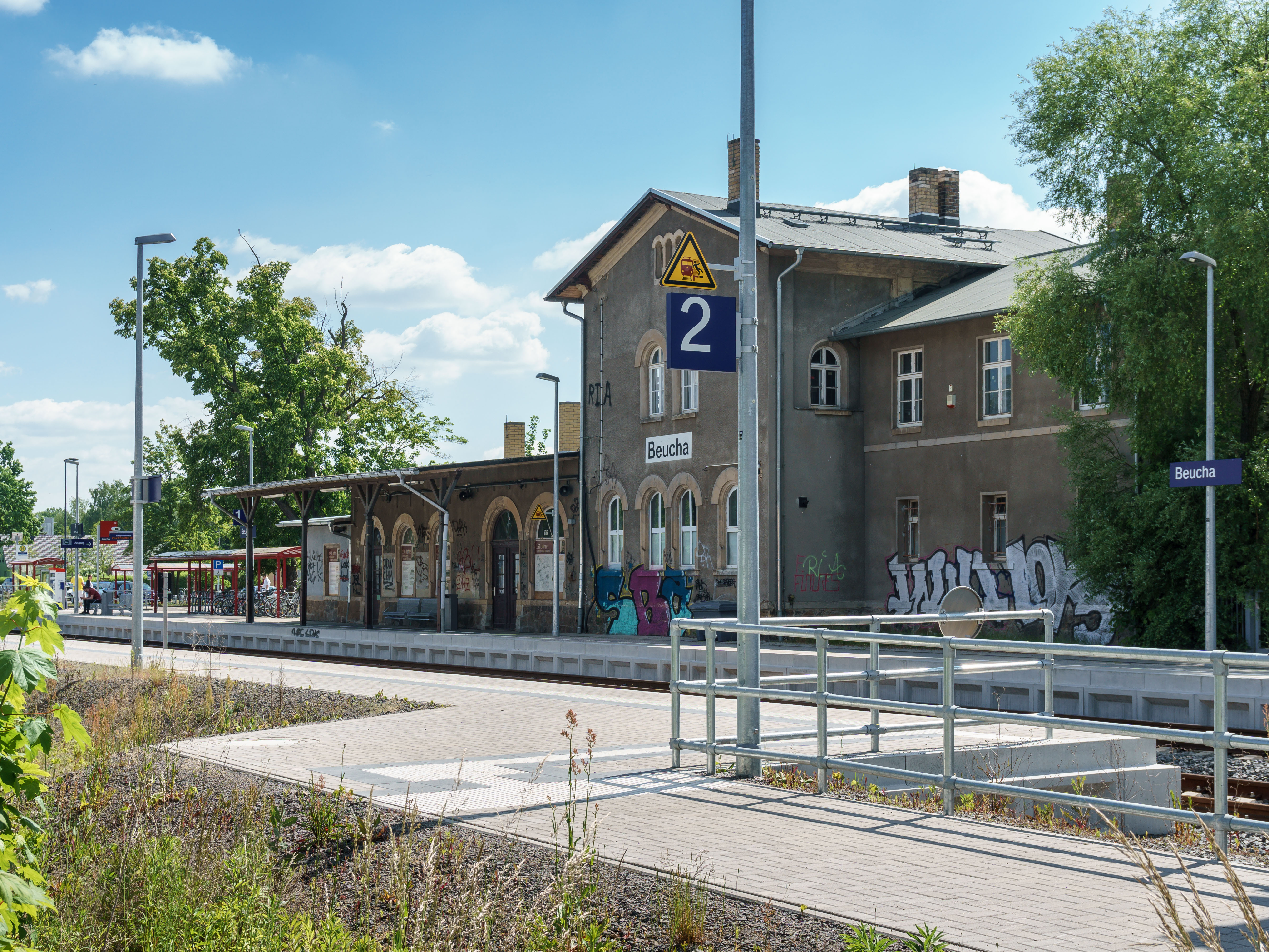 Bahnhof, Albert-Kuntz-Straße 62 in Brandis OT Beucha